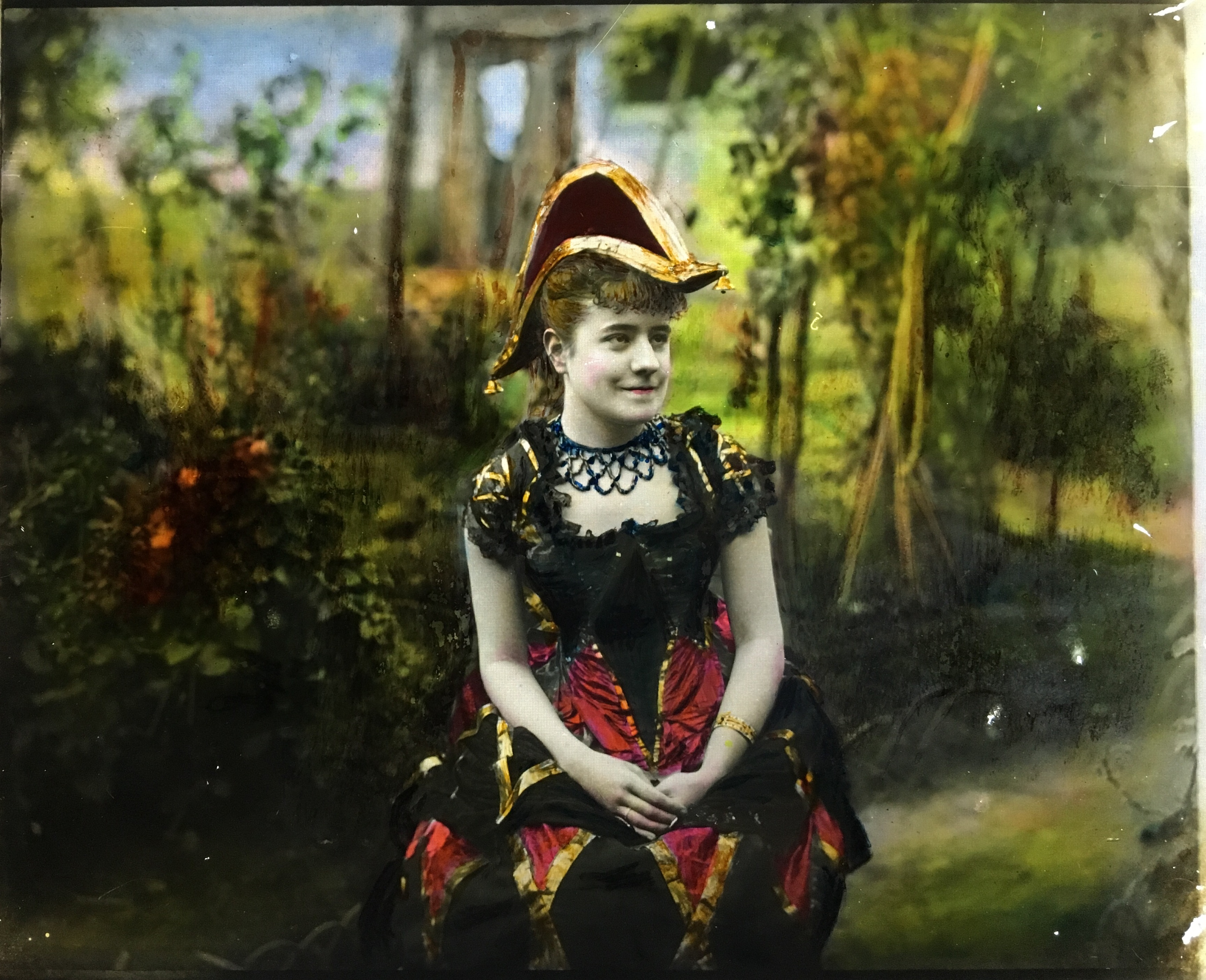 Reproduccion fotográfica del daguerrotipo pintado a mano de Camerina Pavón y Oviedo